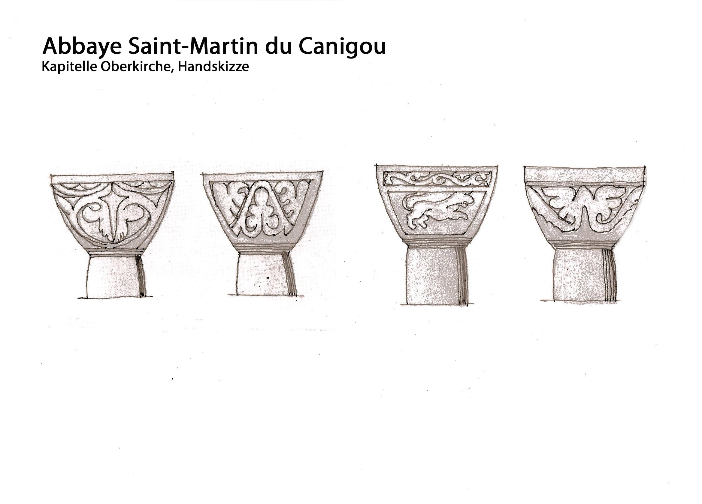 Abbaye_Saint-Martin du Canigou,_Kapitelle_Oberkirche,_Handskizze